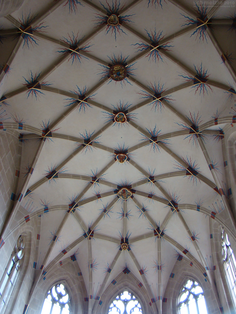 Gewölbe im Chor der Alexanderkirche in Marbach am Neckar mit Jörgschem Wappen als Schlussstein